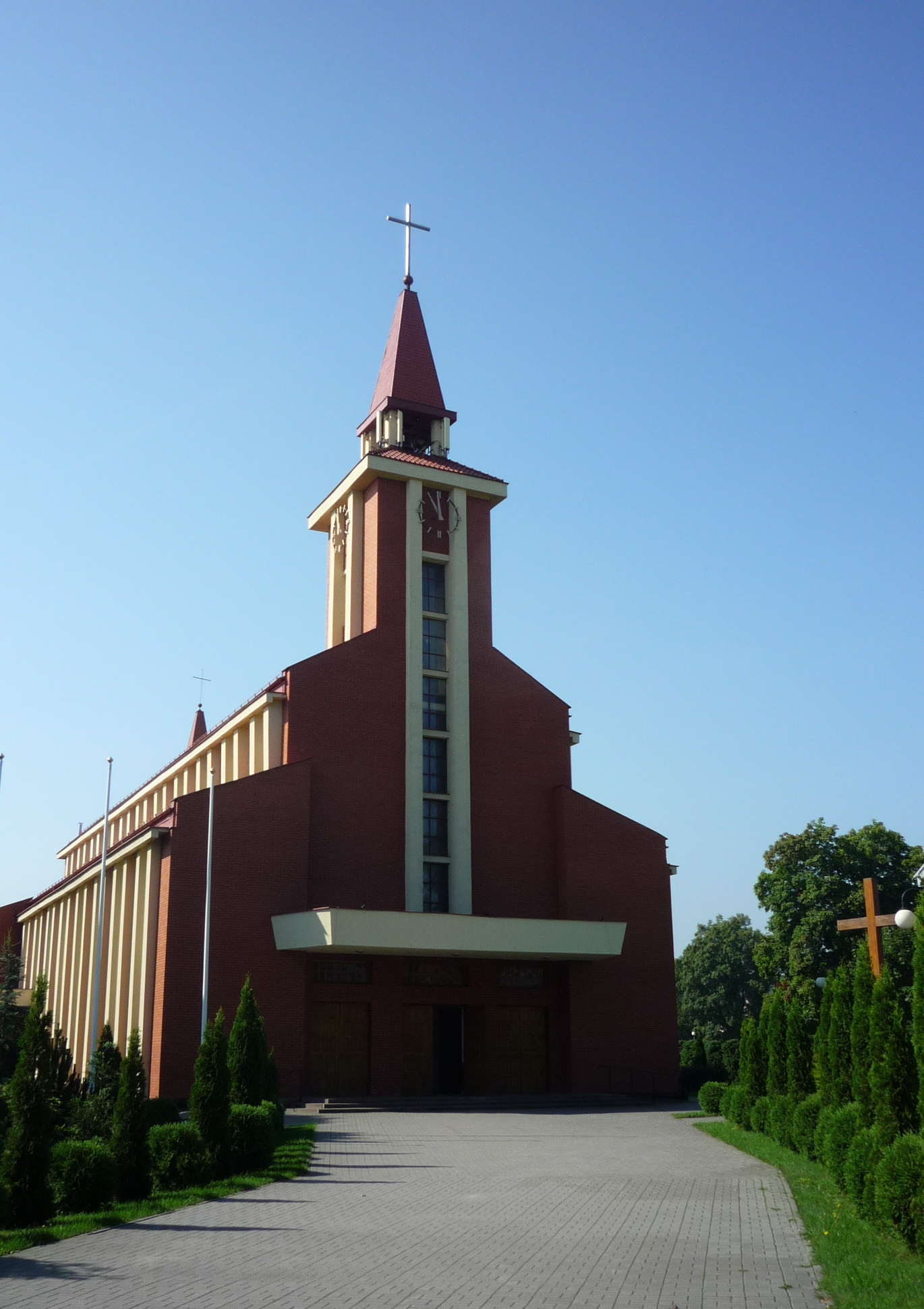 Kościół św. Jana z Kęt w Rumi